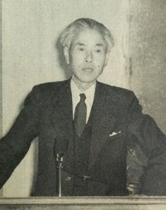 恒藤恭（1956年度大阪市立大学入学式にて）